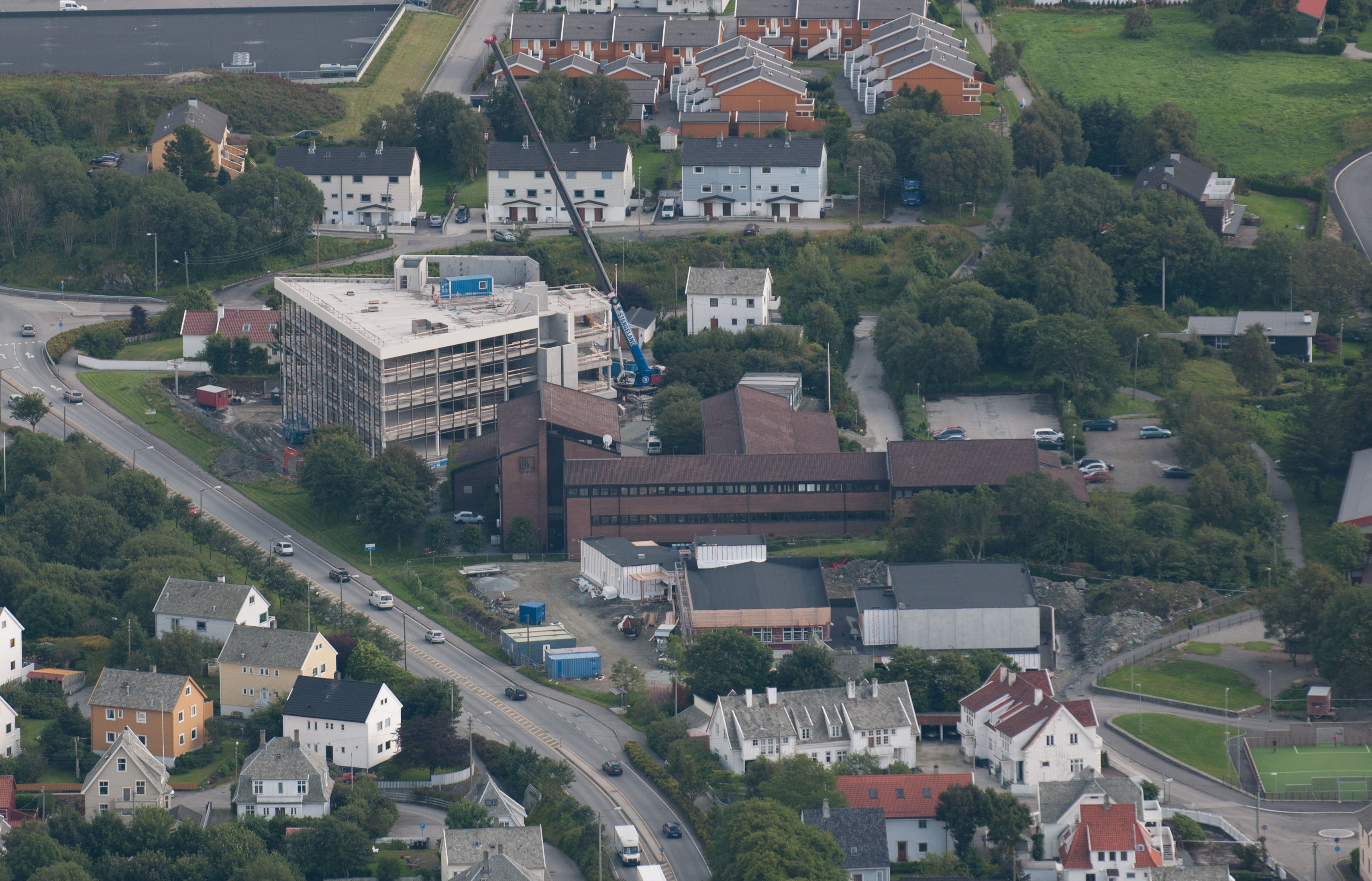 Bildet tatt fra luften over Haugesunds Avis nytt og gammelt bygg. Bildet er tatt av Daniel Rufus Kaldheim. Jobber som utvikler i Haugesunds Avis. Bildet er tatt fra Seilfly fra Haugaland Seilflyklubb